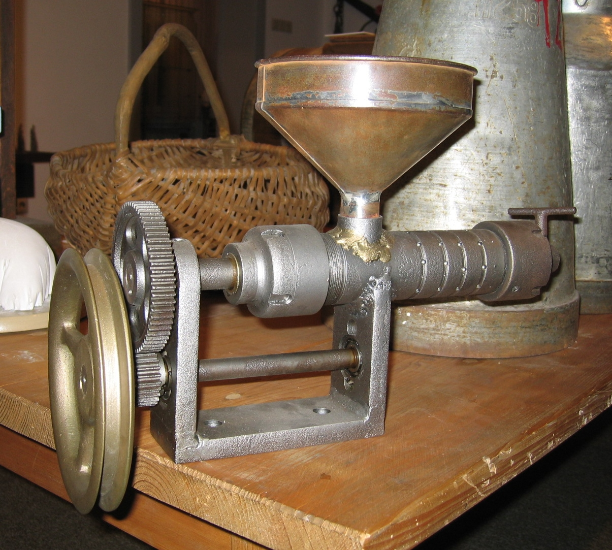 Bäuerliches Arbeitsgerät im Heimatmuseum in Halver.